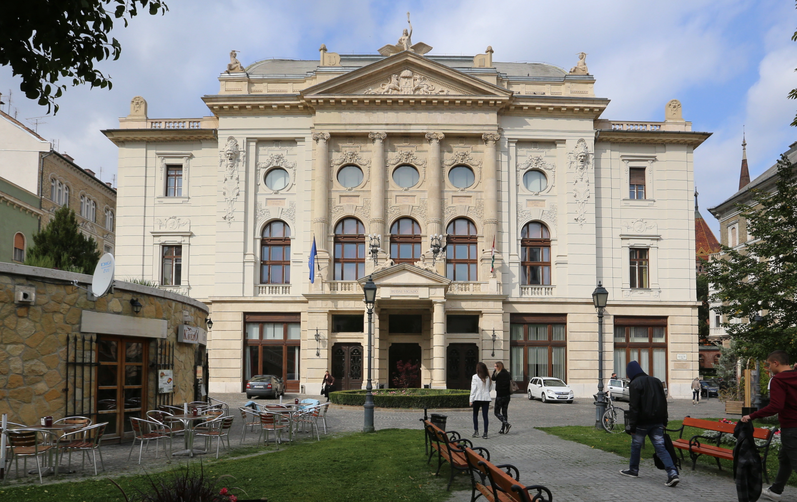 Budai Vigadó This is a photo of a monument in Hungary. Identifier: 12221